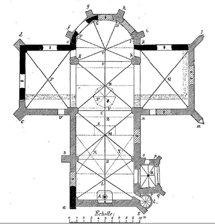 Plan au sol de l'église Saint-Cyr et Saint-Julitte à Saint-Cyr-sur-Loire par Léon Lhuillier 1886